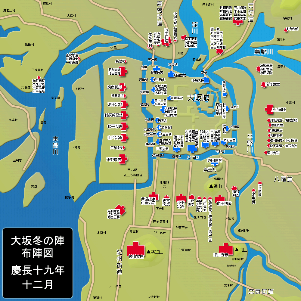 大坂冬の陣布陣図。投稿者Jmho 2006年10月26日 (木) 15:25 (UTC)が作成